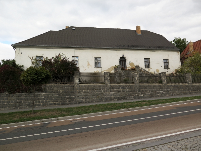 Fara, Bělčice 1, náměstí, Bělčice.